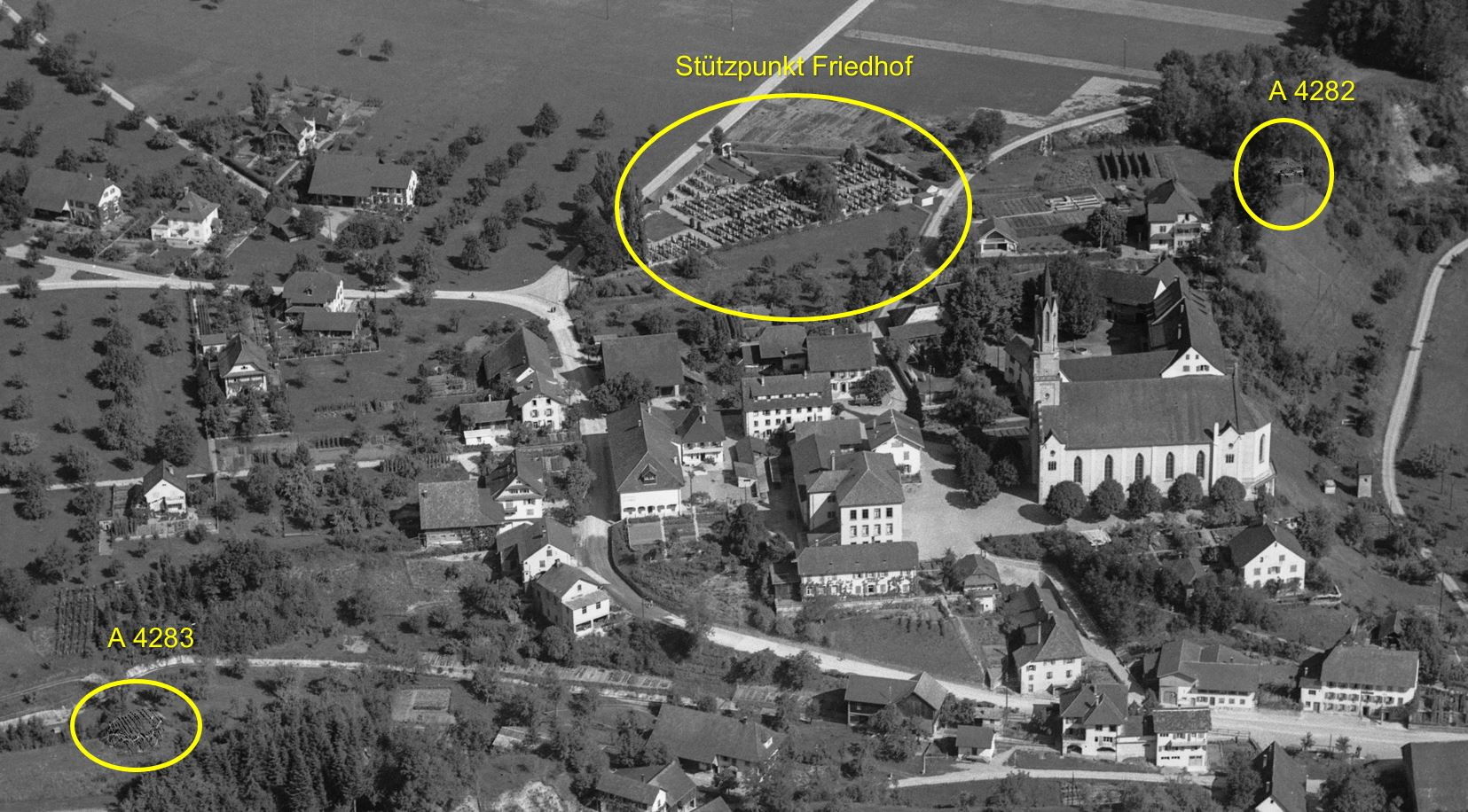 Sperrstelle Leuggern AG, Schweiz